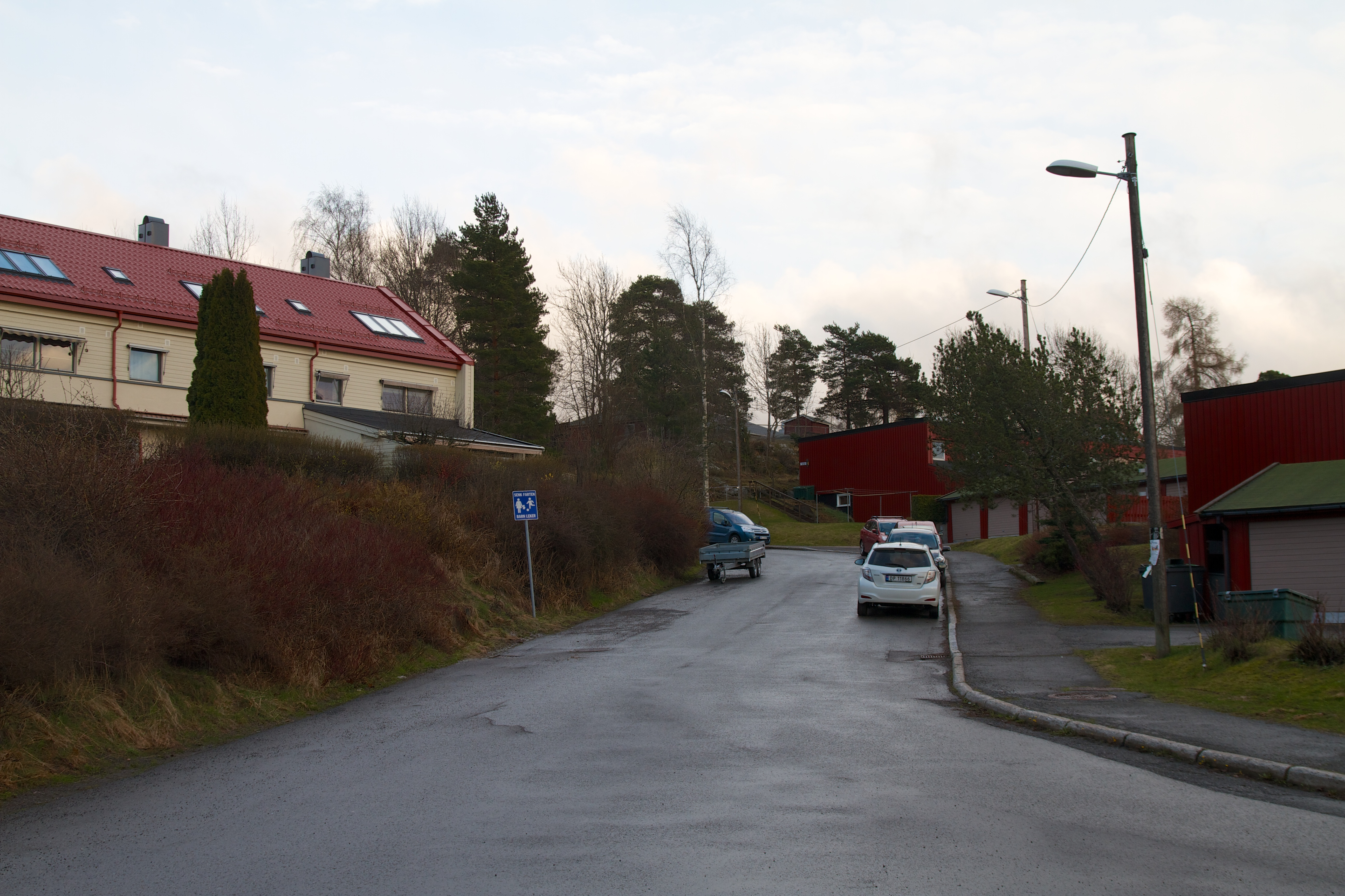 Bogerudslyngen på Bogerud i Oslo.